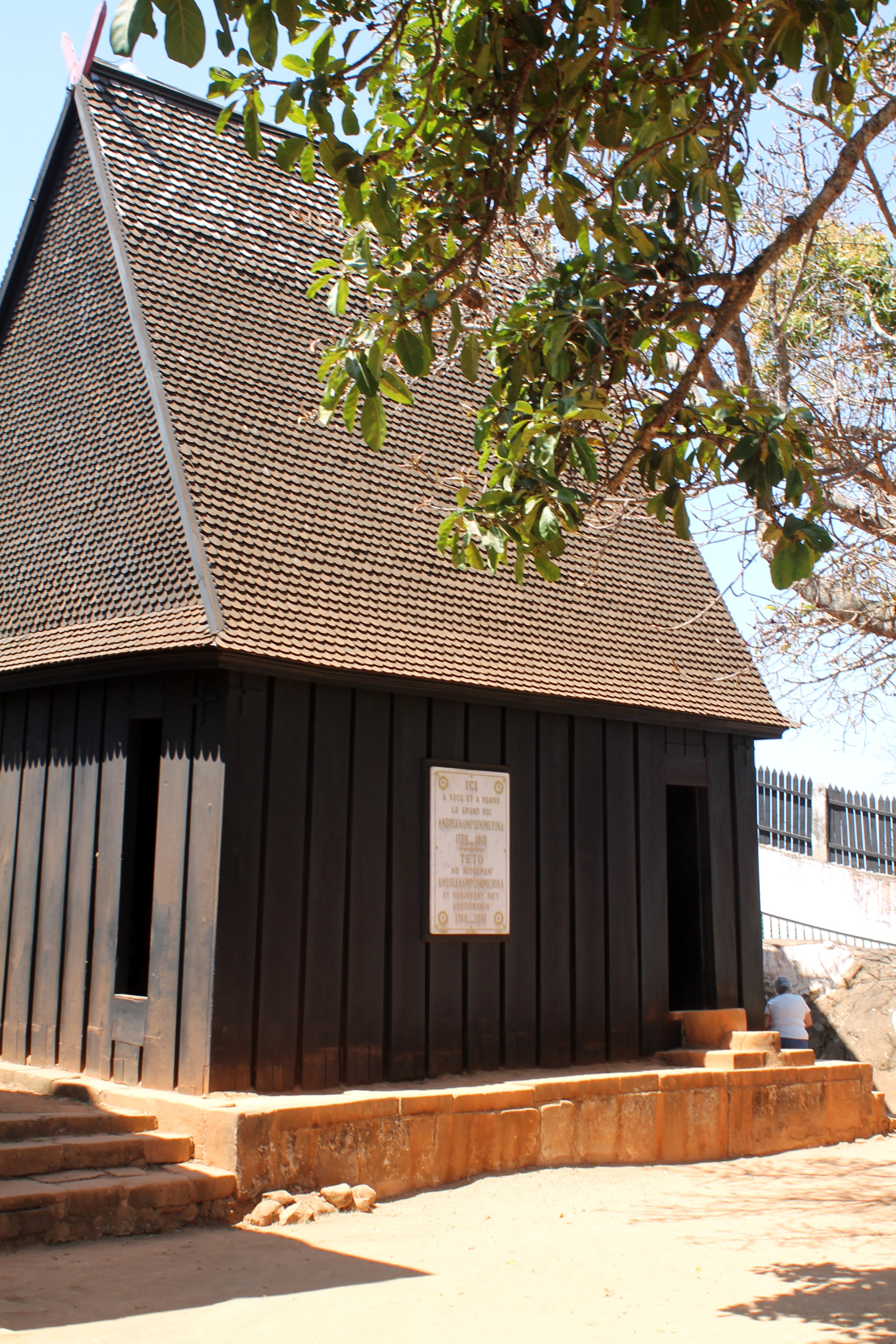 Ambohimanga